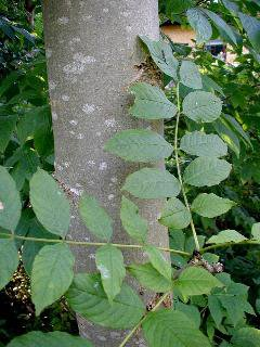 Fraxinus excelsior